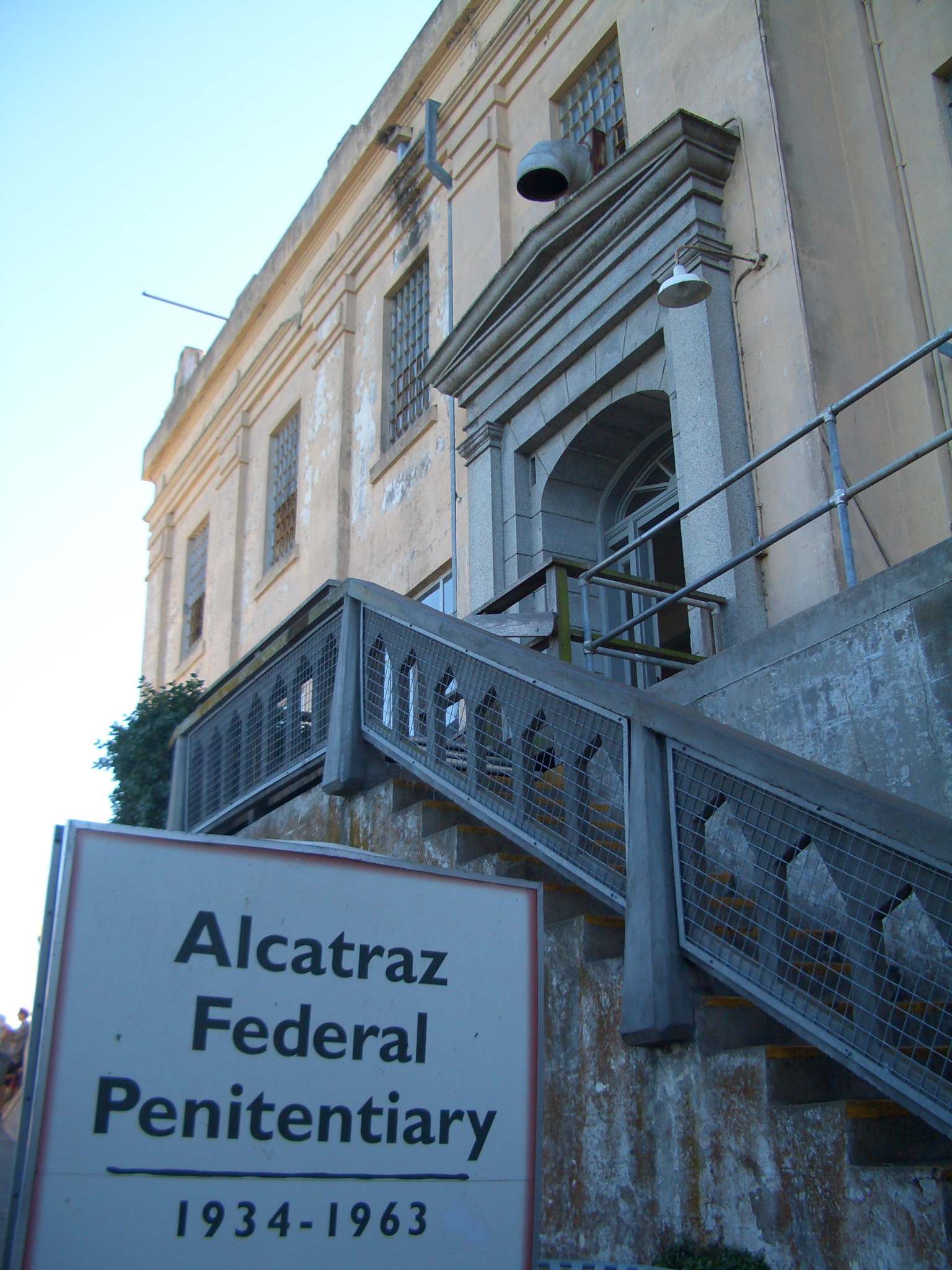 Entrance to Alcatraz Federal Penitentiary